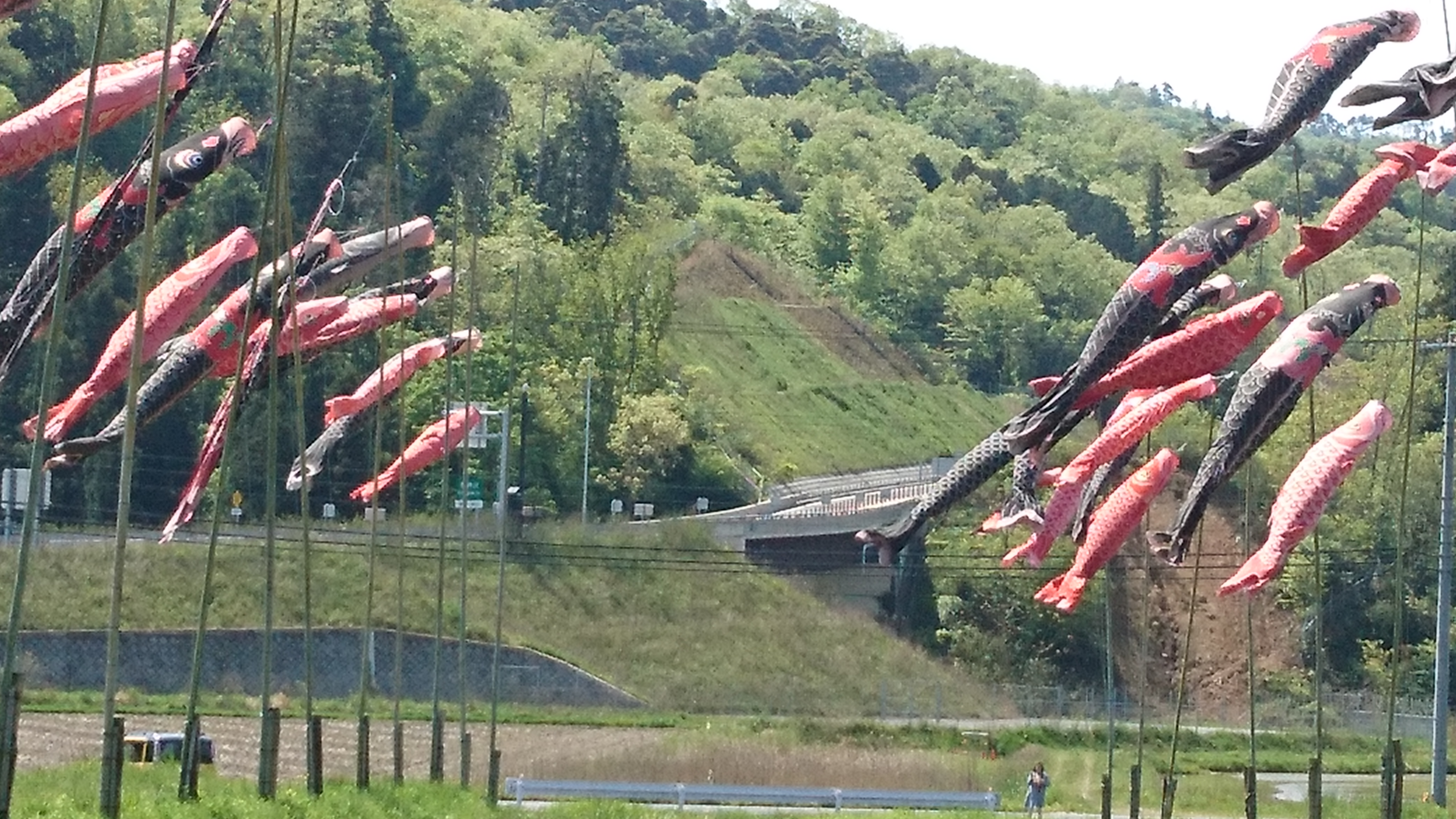 京丹後大宮インターチェンジ付近のこいのぼり